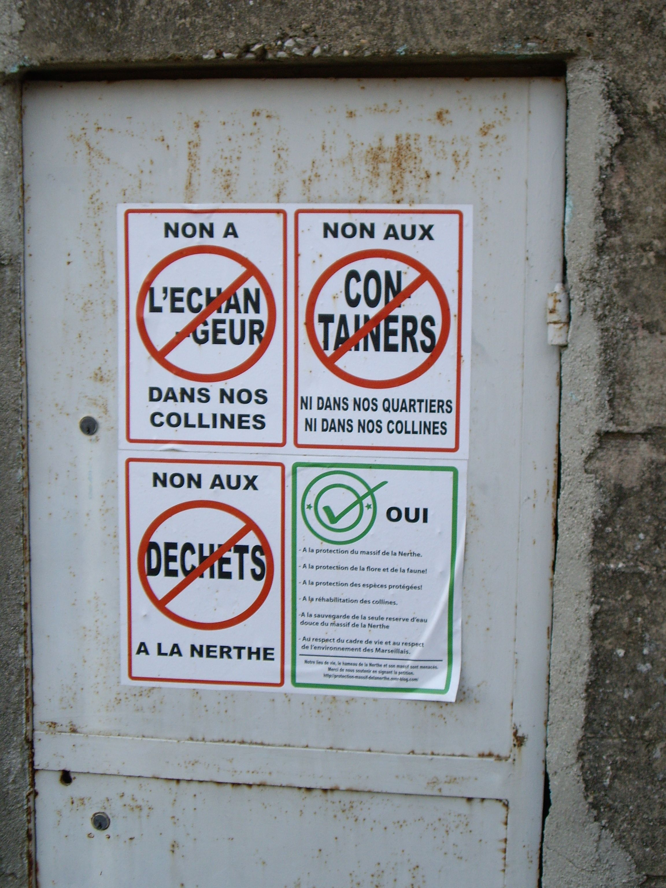 Affiches de protestation dans le quartier de l'Estaque à Marseille, contre les projets industriels autour du hameau de La Nerthe (dans les hauteurs du quartier voisin des Les Riaux) et pour la protection de la faune, la flore et les réserves d'eau douce dans le massif de la Nerthe (également appelé chaîne de l'Estaque).